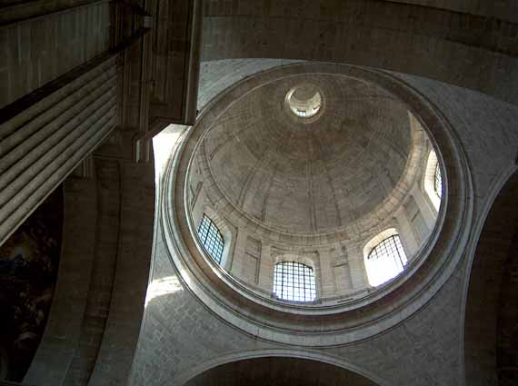 Cimborrio y cúpula de El Escorial Foto realizada por es::Usuario:AnTeMi que cede a Wikipedia. Categoría:Monumentos (imagen)